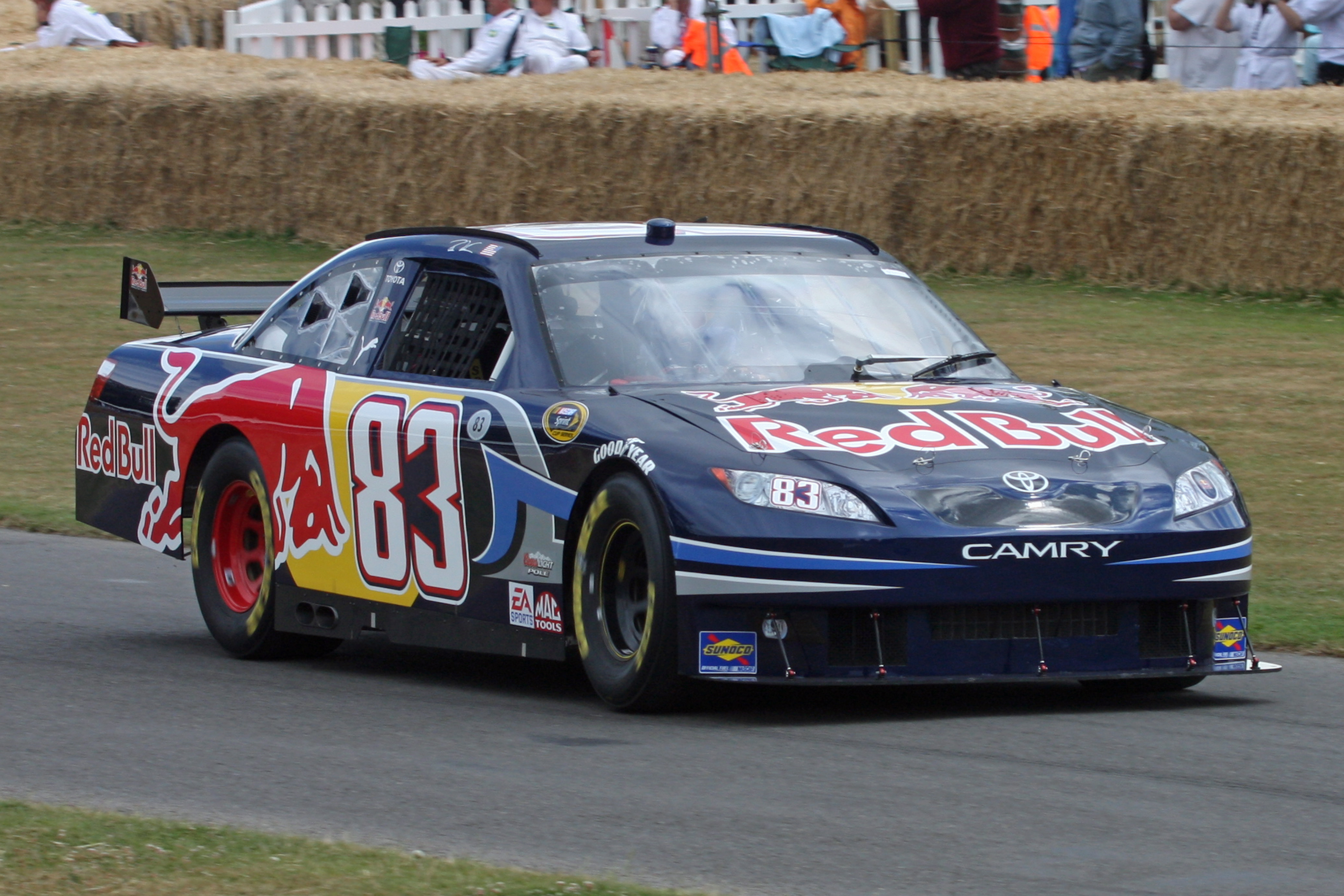 2009 Toyota Camry